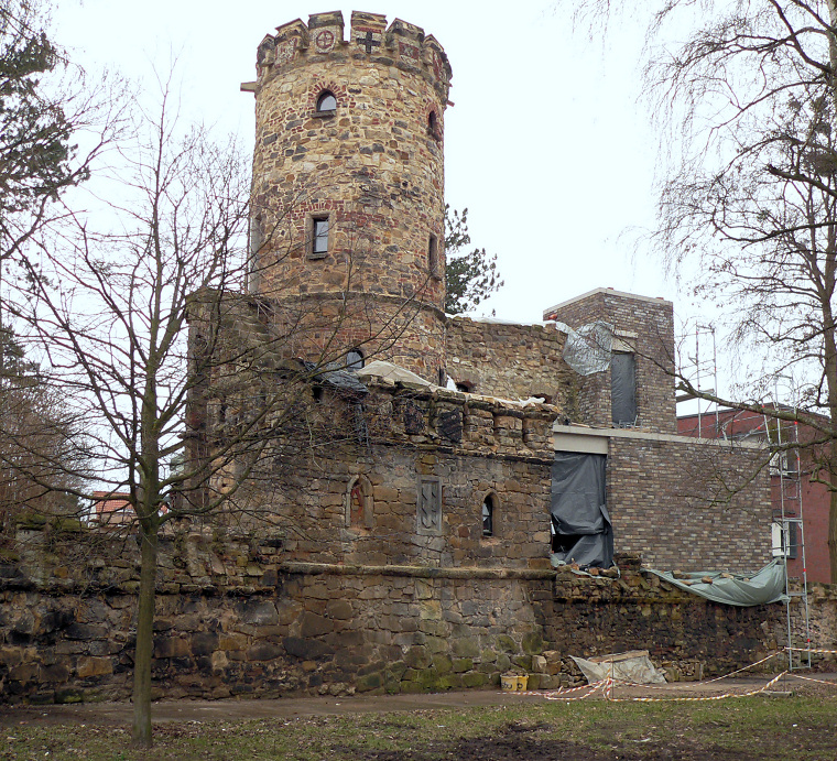 Nachgebaute Ritterburg nahe dem Parkhaus in Herrenhausen